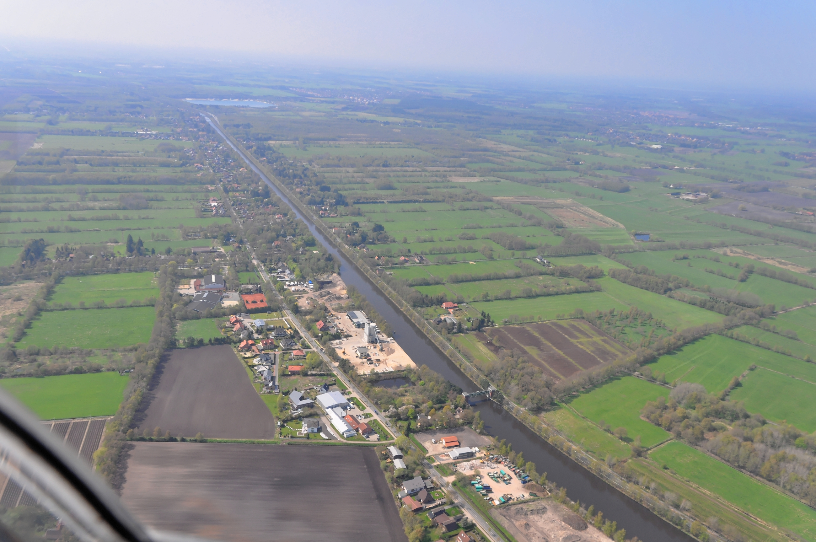 Luftbilder von der Nordseeküste 2013-05 – Das Naturschutzgebiet „Everstenmoor“ liegt nördlich des Küstenkanals (auf dem Foto rechts) östlich des Roten Steinbergsees (auf dem Foto im Hintergrund).